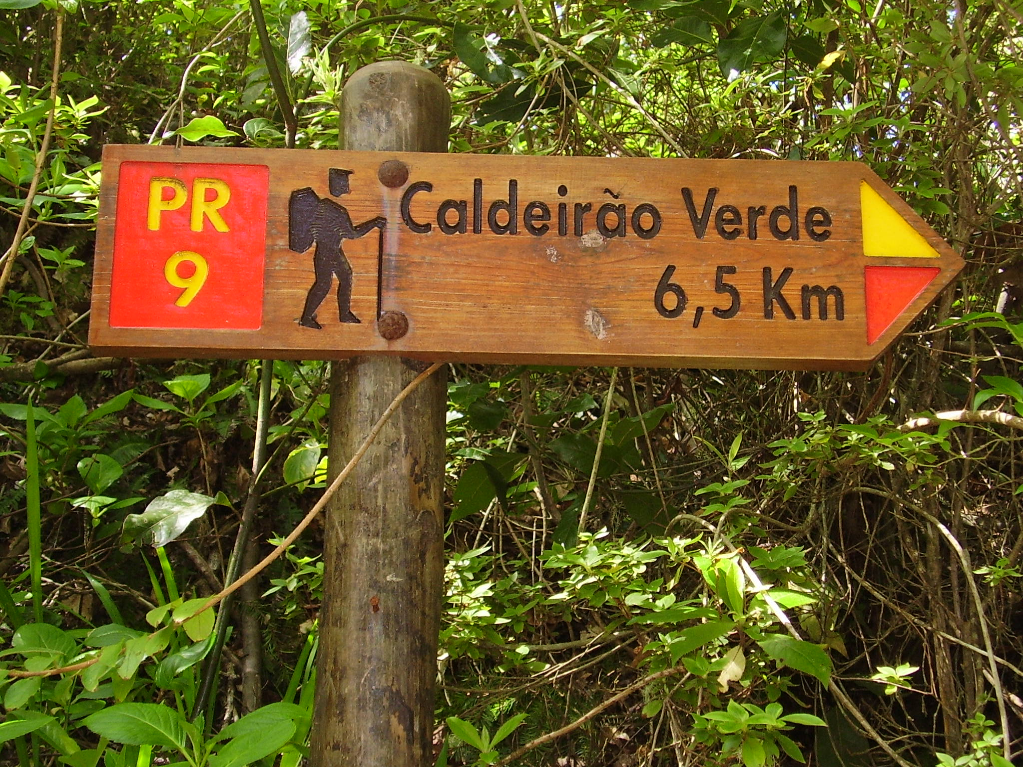 Weg zur Levada Caldeirao Verde bei Santana auf Madeira